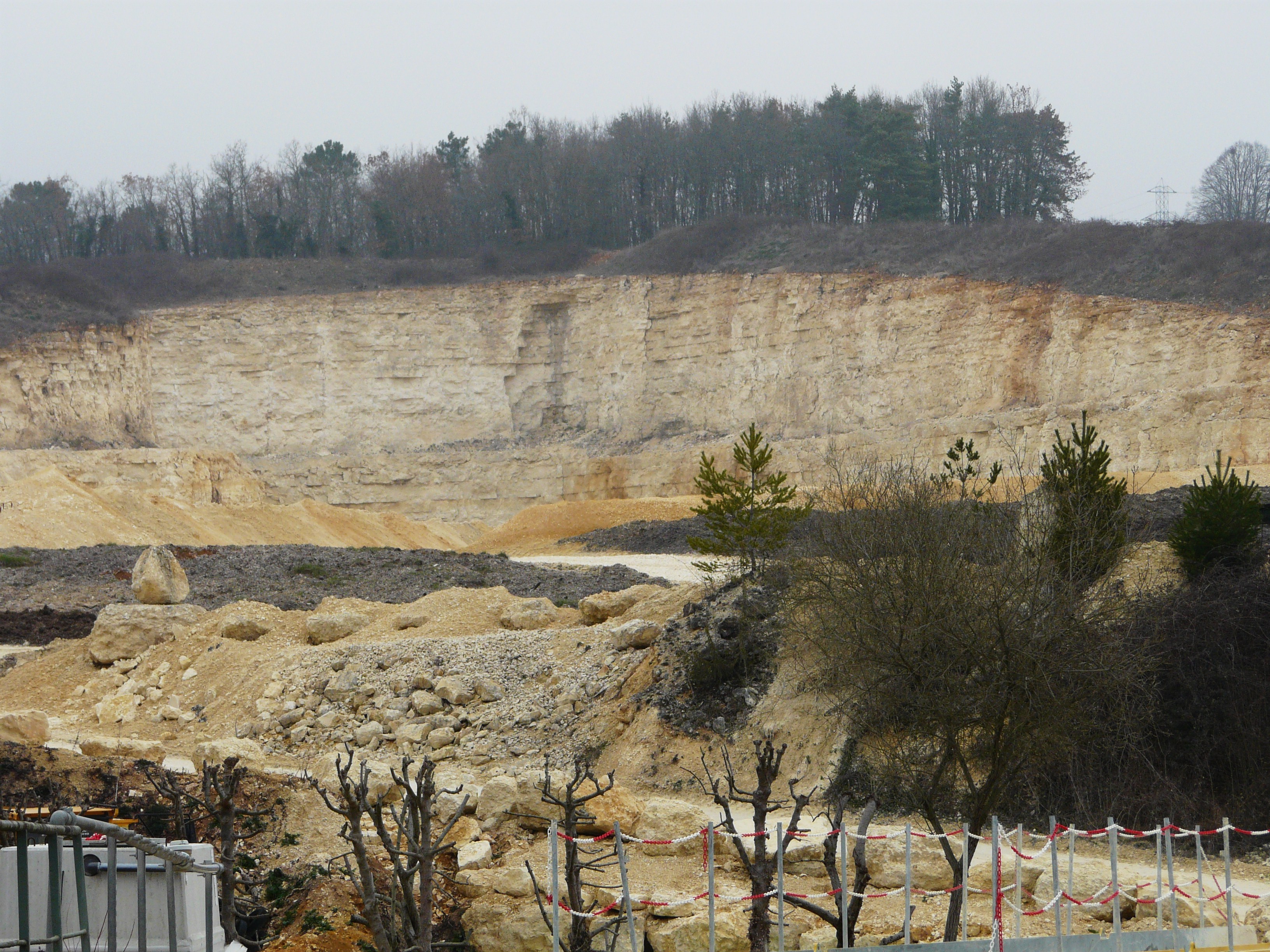 Au lieu-dit le Gué de la Roque, la carrière de calcaire de Lamonzie-Montastruc, Dordogne, France.